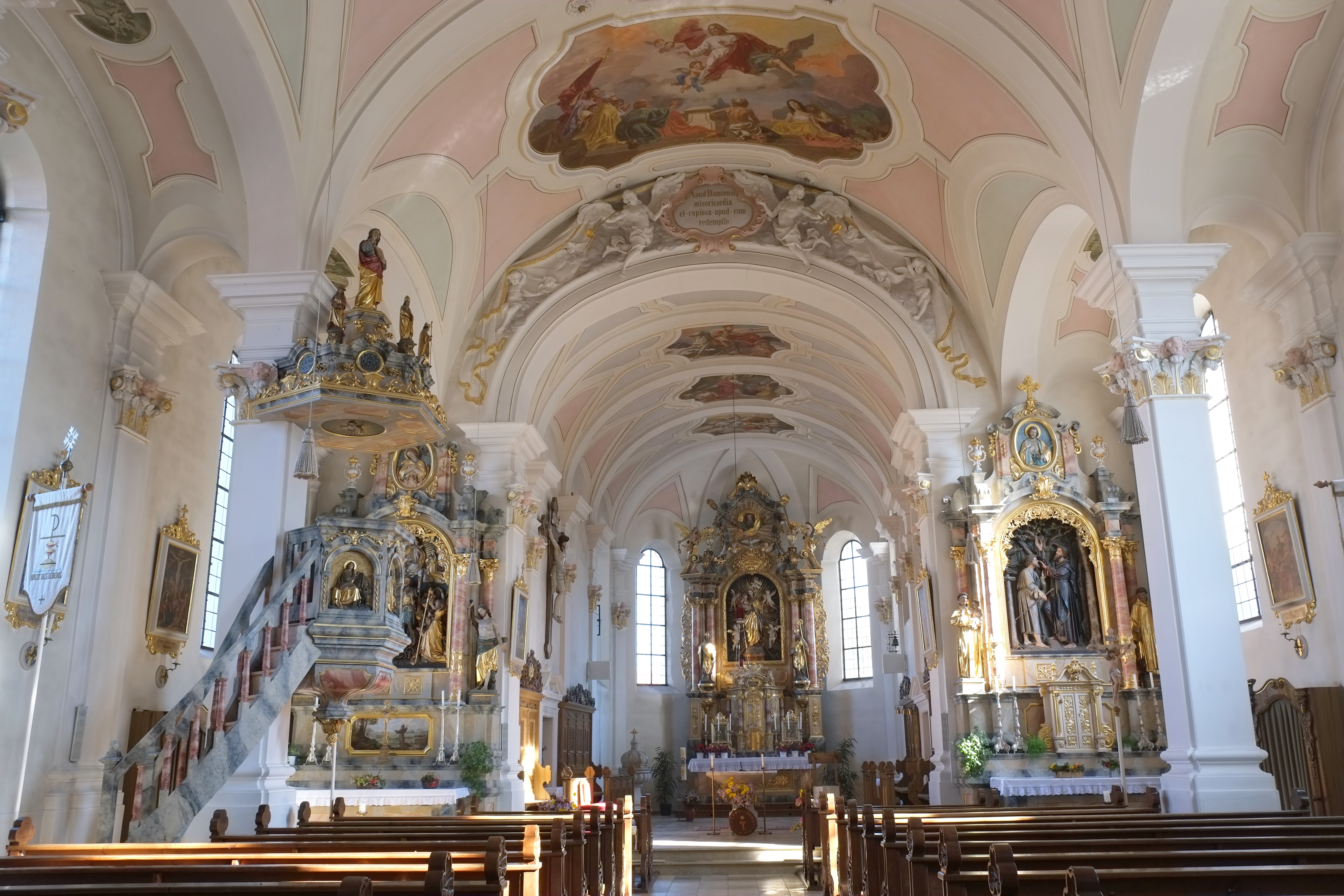 Katholische Pfarrkirche Kirche St. Martin in Blindheim im Landkreis Dillingen an der Donau (Bayern, Deutschland)